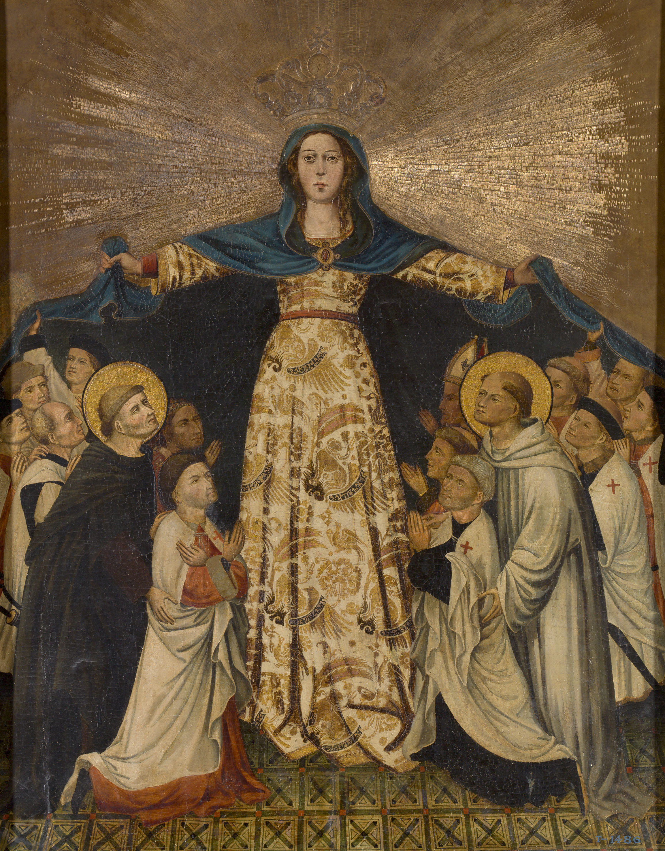 La obra representa a la Virgen María como Nuestra Señora de Gracia y acompañada por algunos de los grandes maestres de la Orden de Montesa.